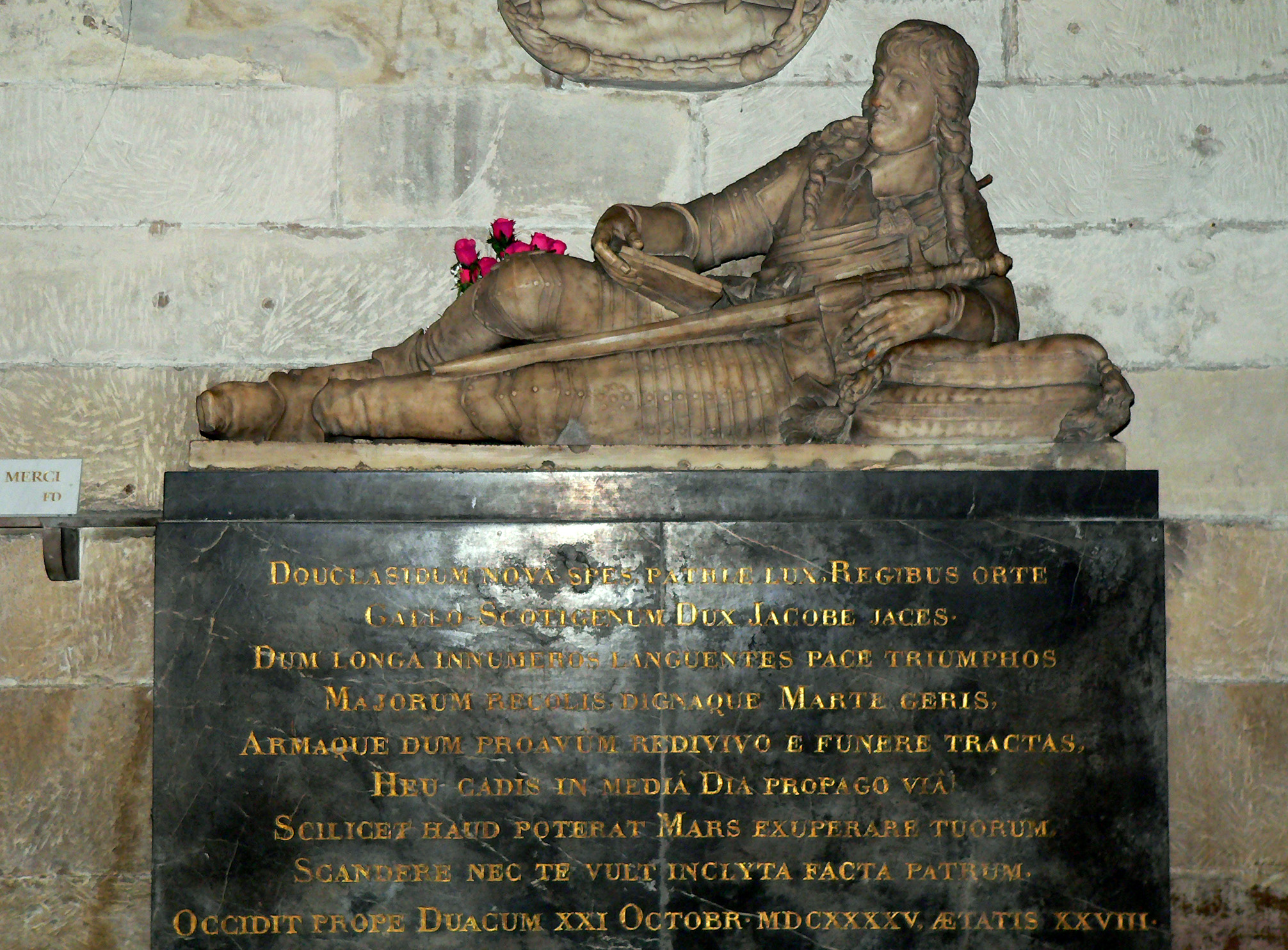 Jacques (James) Douglas, Prince d'Écosse, mort en 1645. Sculpture de Michel Bourdin (1609-1678).